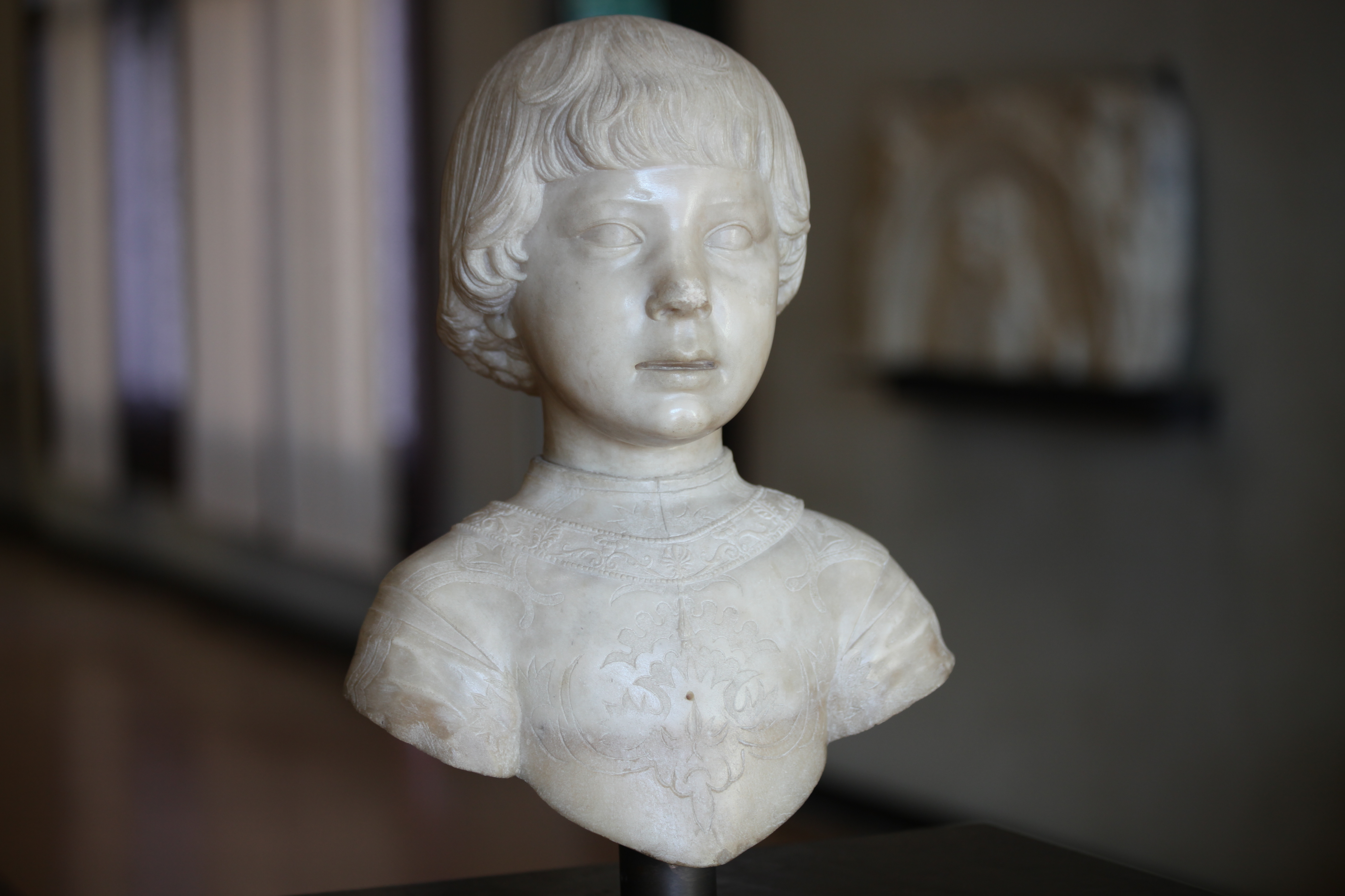 Galleria G. Franchetti alla Ca' d'Oro - MIBAC This is a photo of a monument which is part of cultural heritage of Italy.